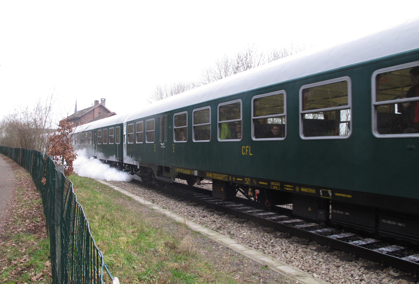 Wegmann Eisenbahnwagen der CFL